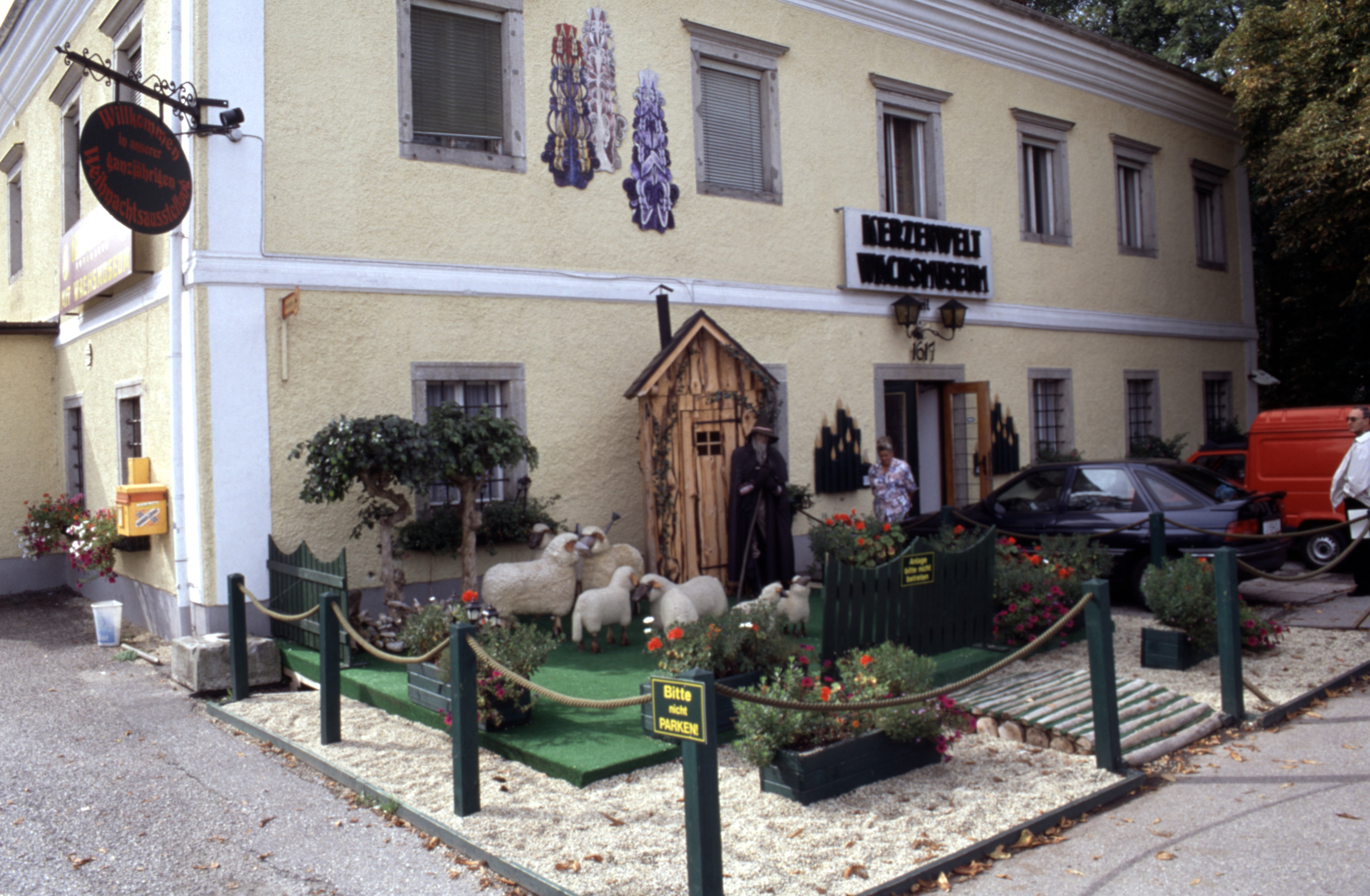 Kerzenwelt Schlägl mit Wachsmuseum in Schlägl, Oberösterreich, September 1999.